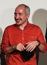 نخستین دوره اعطاء نشان عکاس سال مطبوعاتی ایران